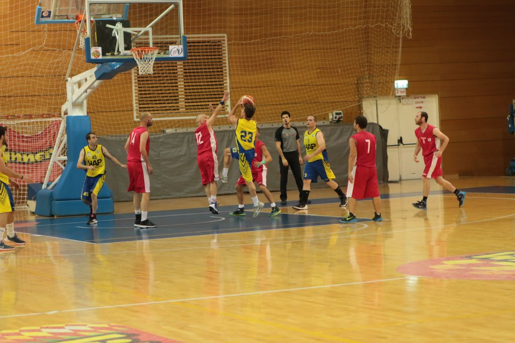 גמר אליפות ליגה כדורסל 2016 שועלי באר שבע - לב תל אביב, דרומיים זכו באליפות לאחר סל עונשין מנצח בשנייה אחרונה של משחק בתוצאה 77:76.